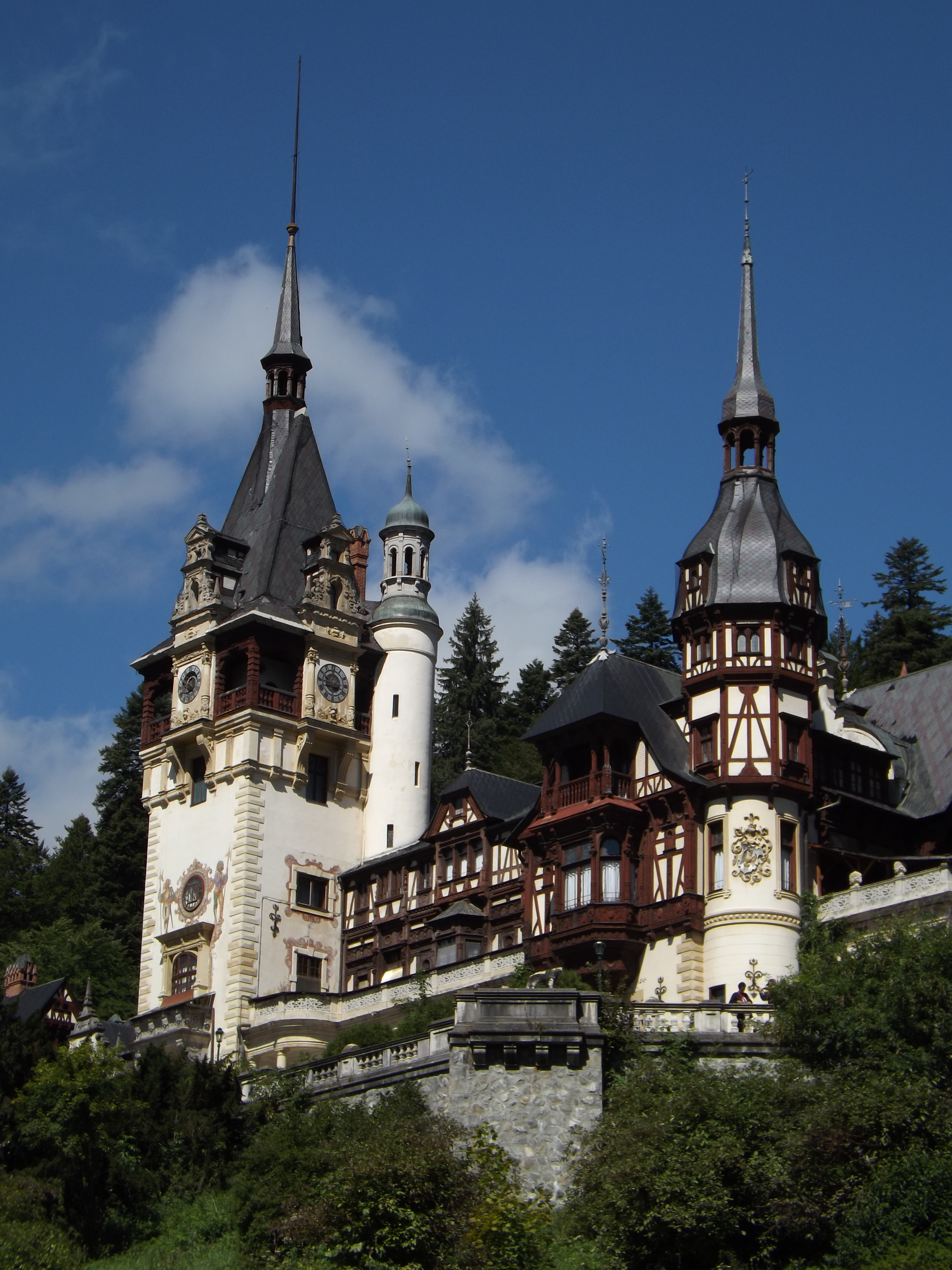 Castelul Peleș este un palat din Sinaia, construit între 1873 și 1914. Fostă reședință de vară a regilor României, în prezent este muzeu. 01